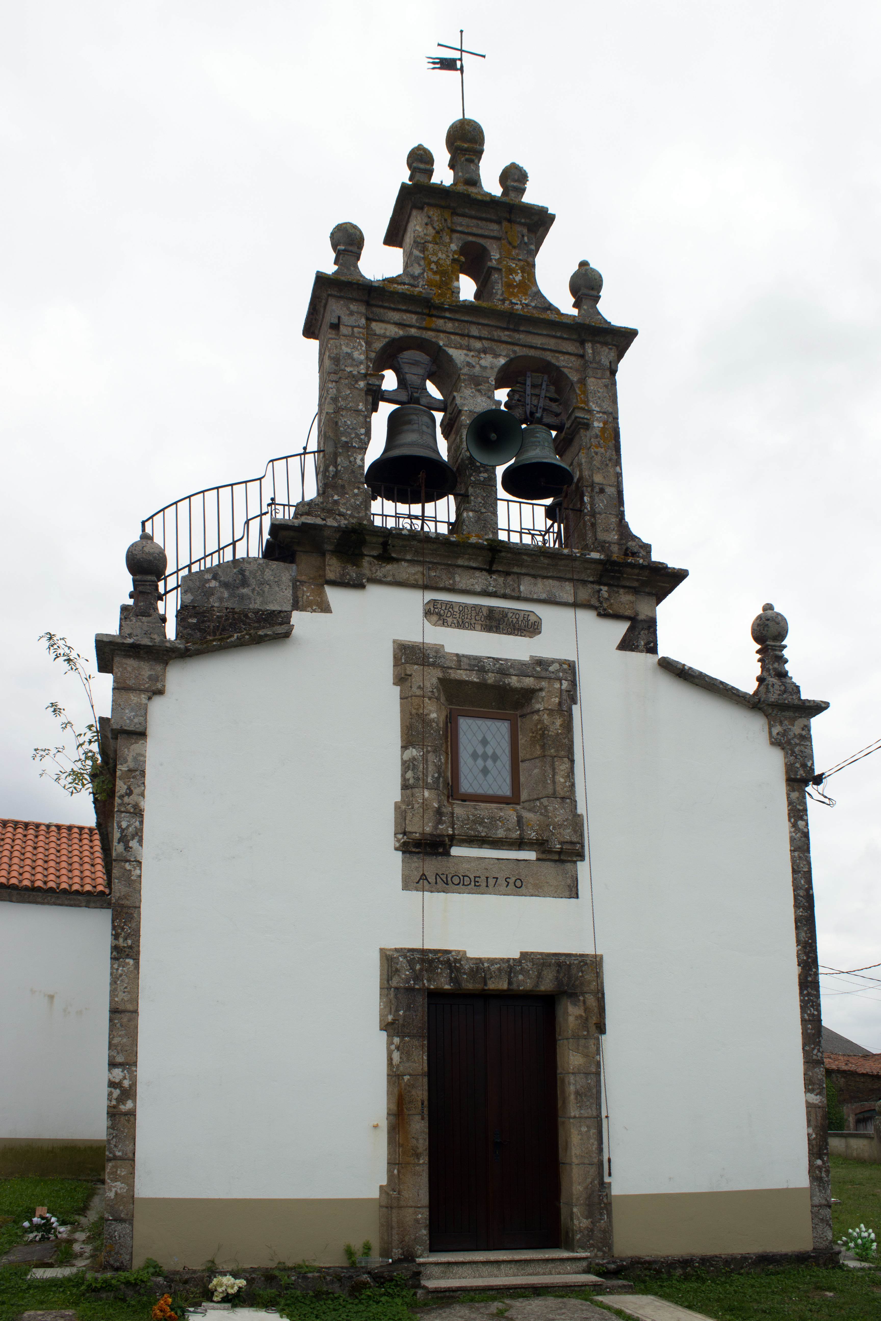 Igrexa de San Vicente de Boqueixón, no concello de Boqueixón.